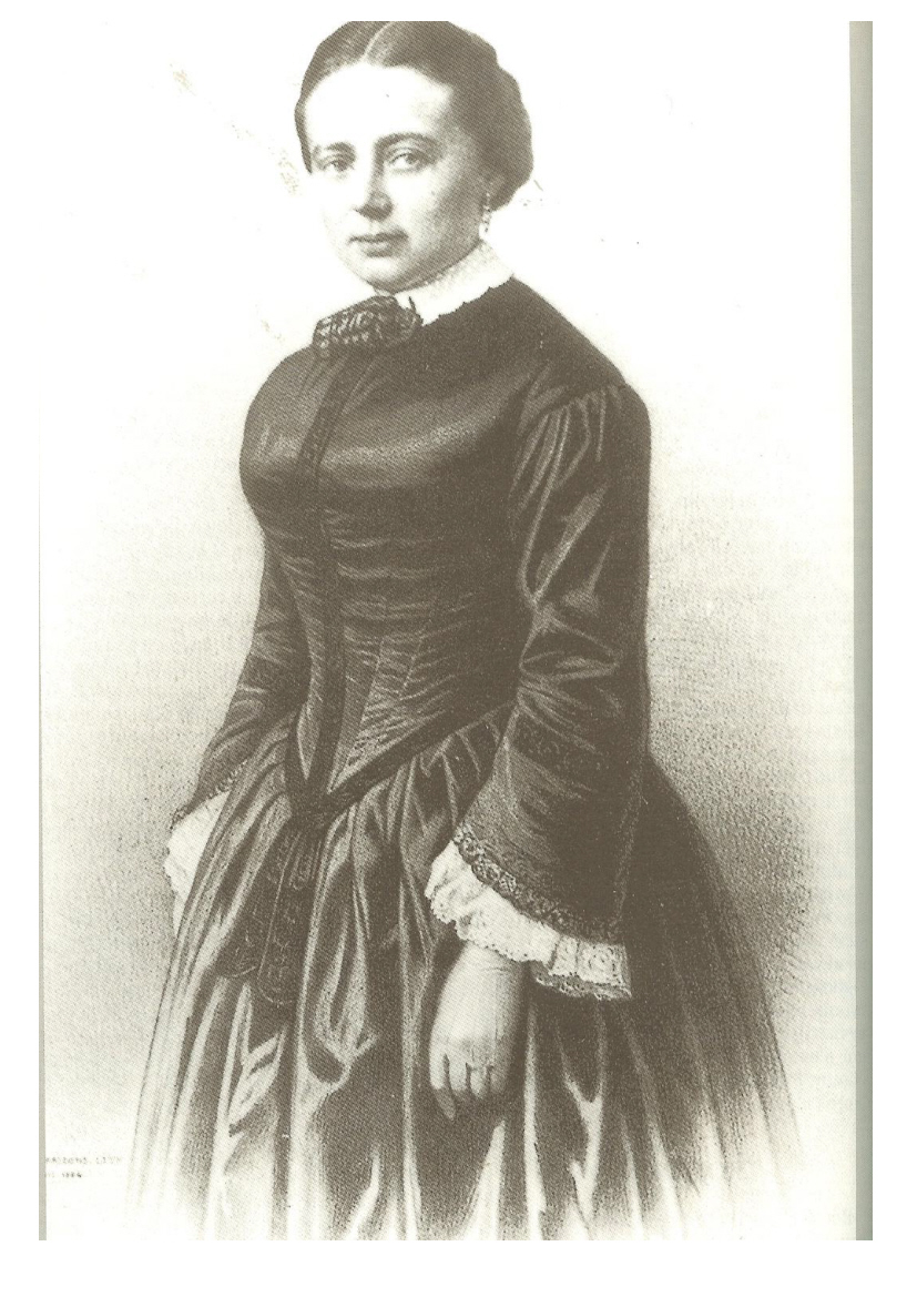 Gazzaniga, morte depuis plus de 70 ans, dans le rôle de Luisa Miller